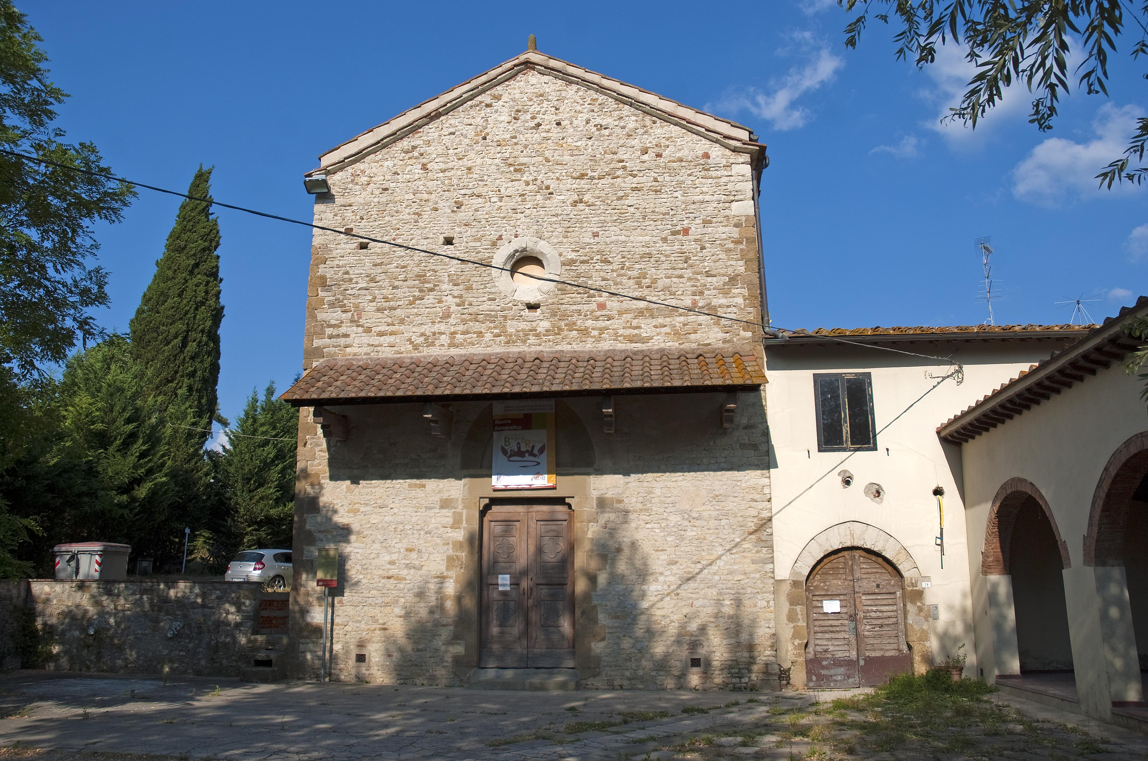 Oratorio di Santa Caterina delle Ruote - Bagno a Ripoli - Firenze